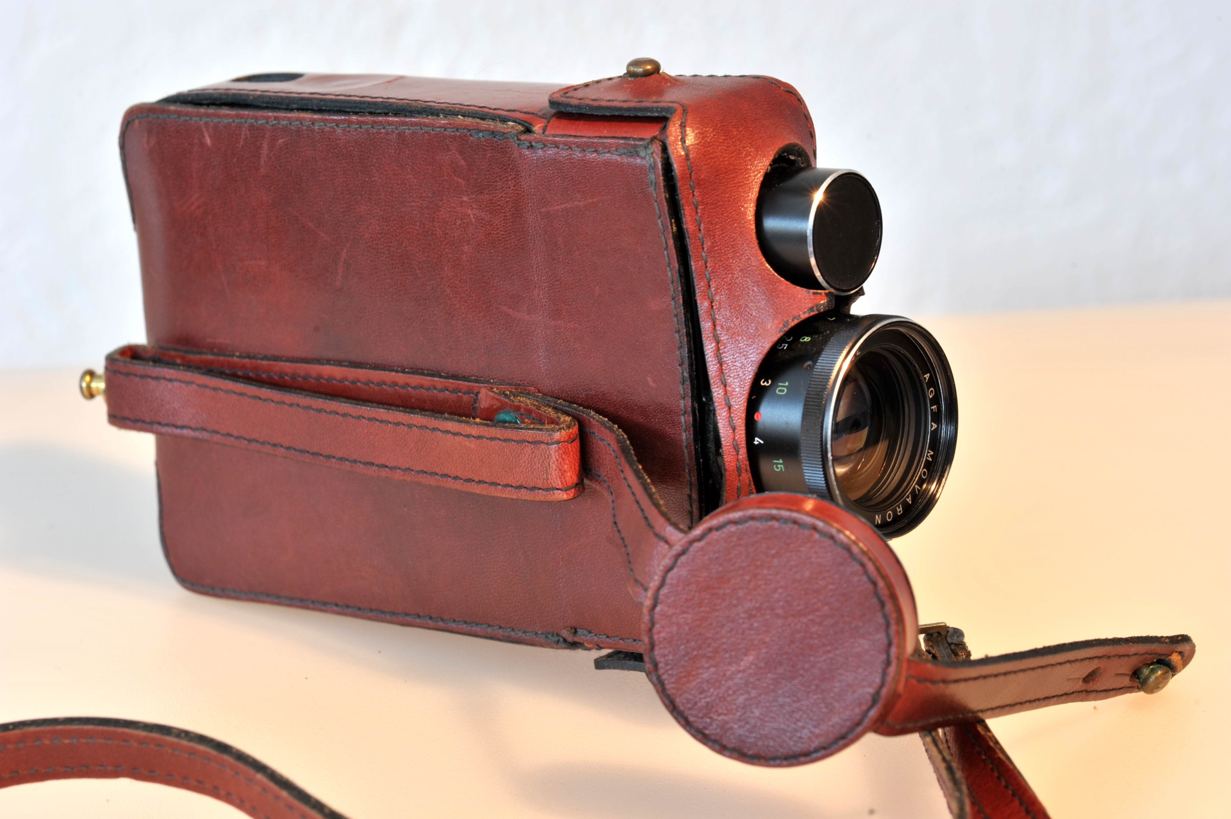 AGFA Microflex 300 Sensor im Etui von Etienne Aigner